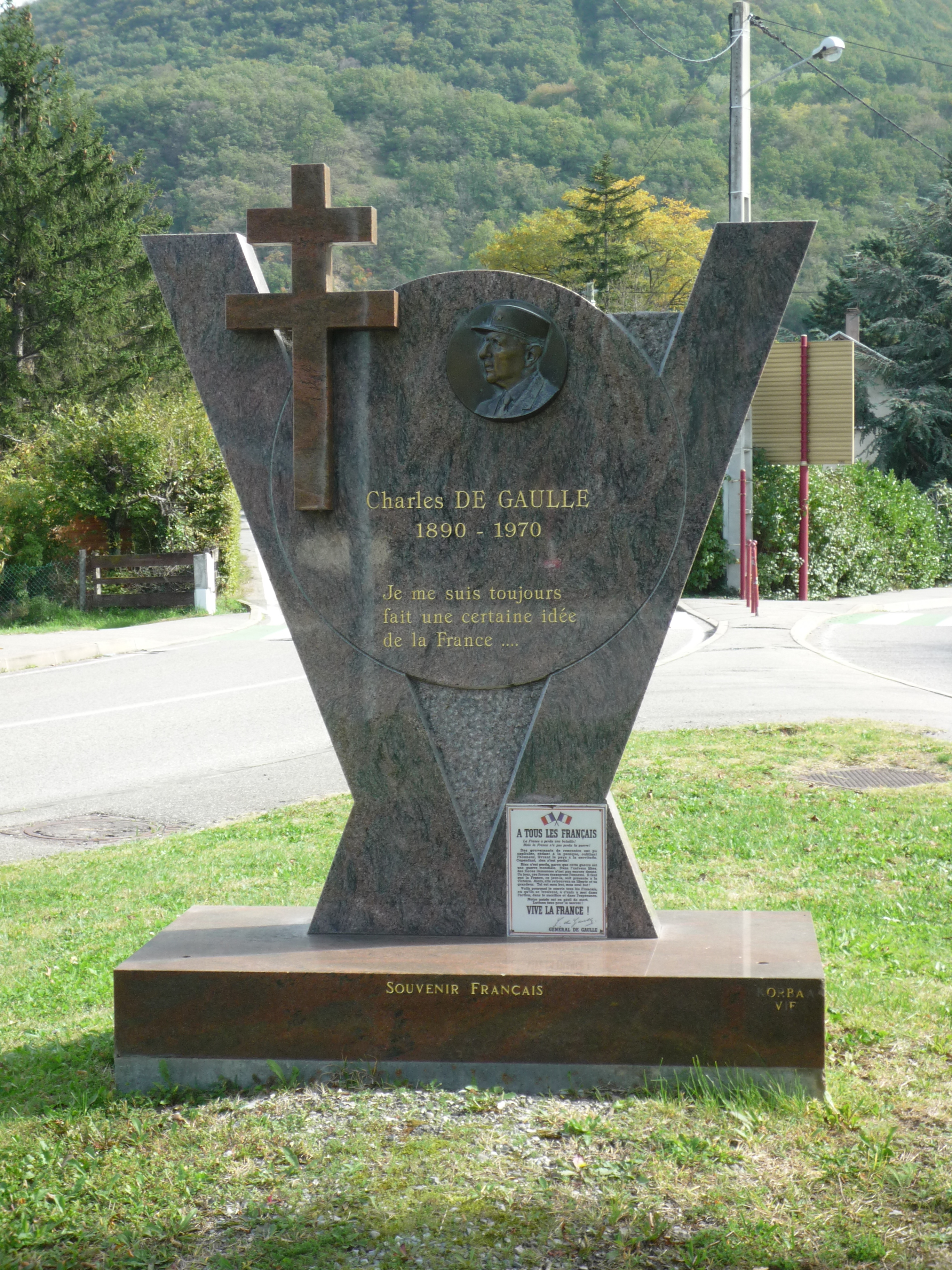 Monument en l'honneur de Charles De Gaulle dans la ville de Vif en Isère.